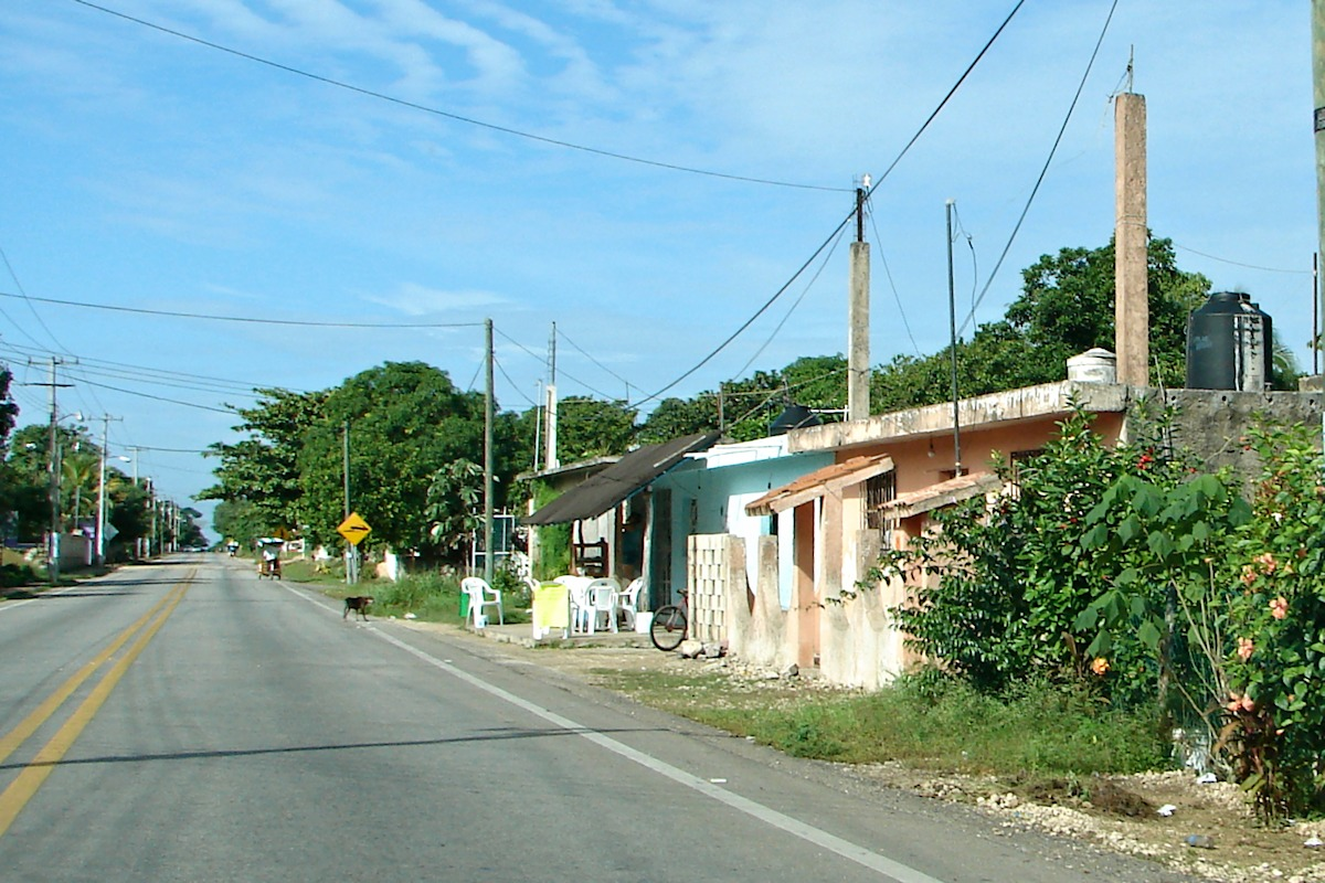 X-Can, Chemax Municipality, Yucatán, Mexico